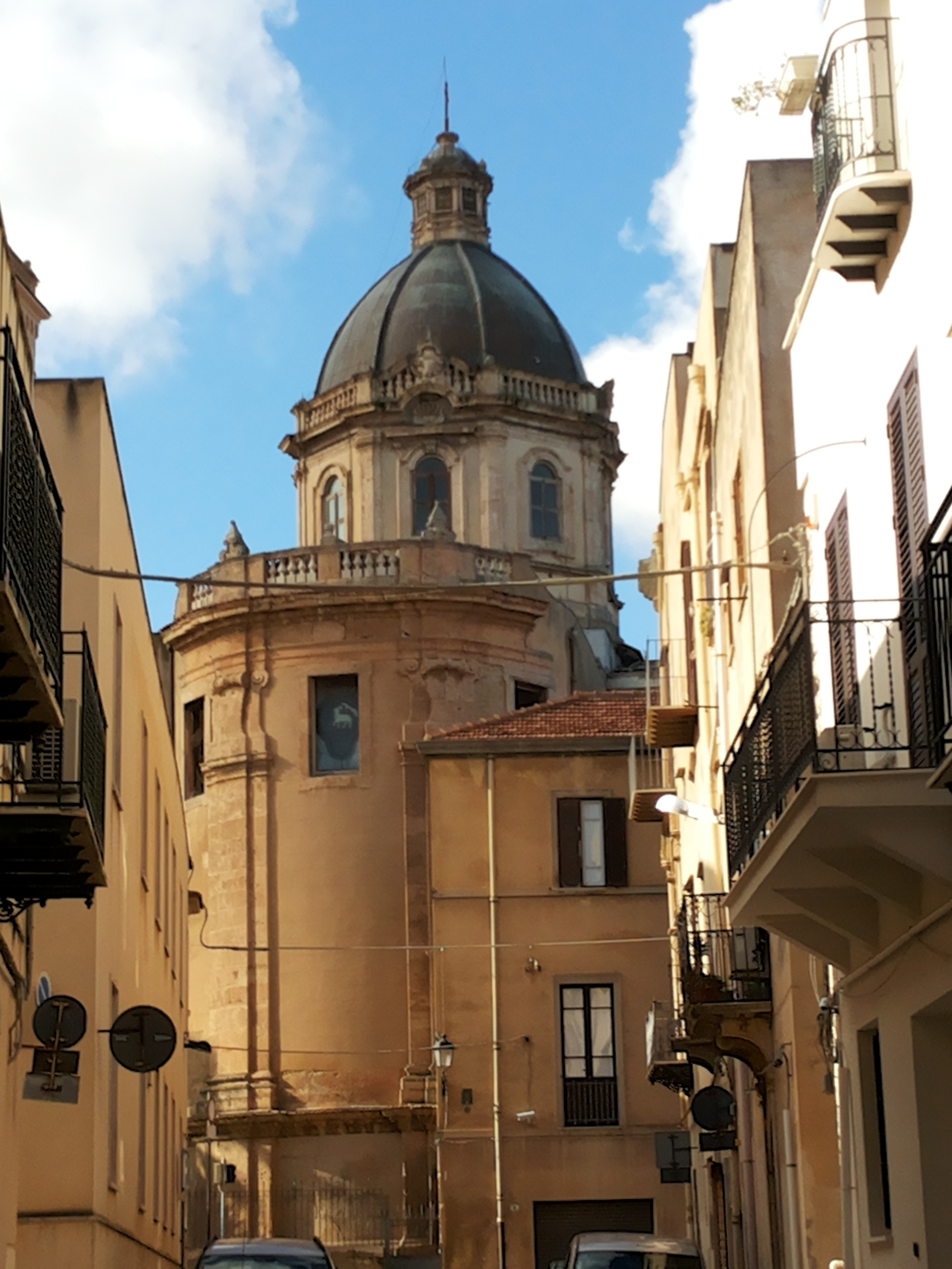 Chiesa Santa Maria Assunta (Alcamo) - Cupola